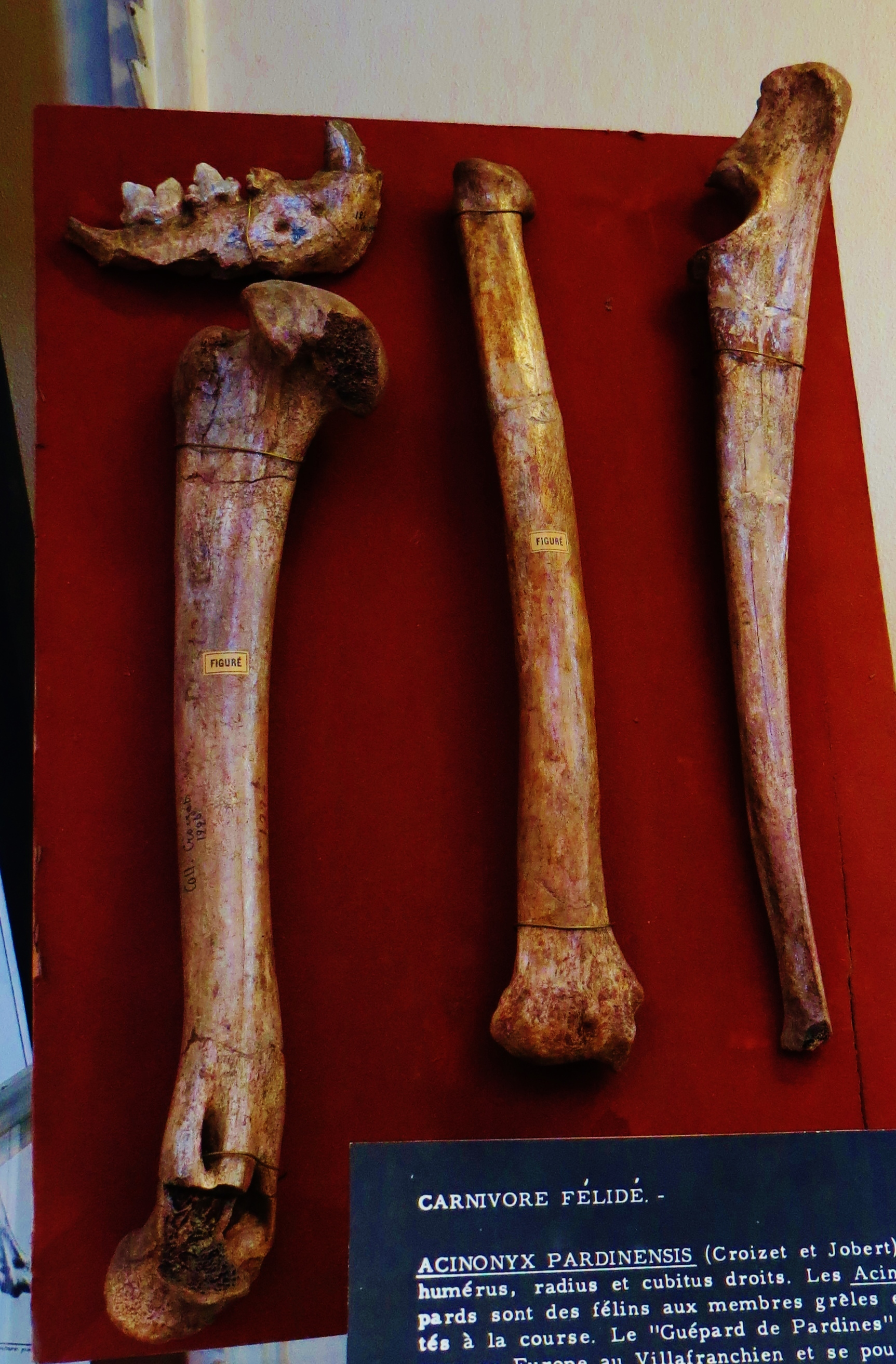 Fossil of Acinonyx pardinensis, an extinct mammal - Took the photo at Museum Histoire Naturelle, Paris